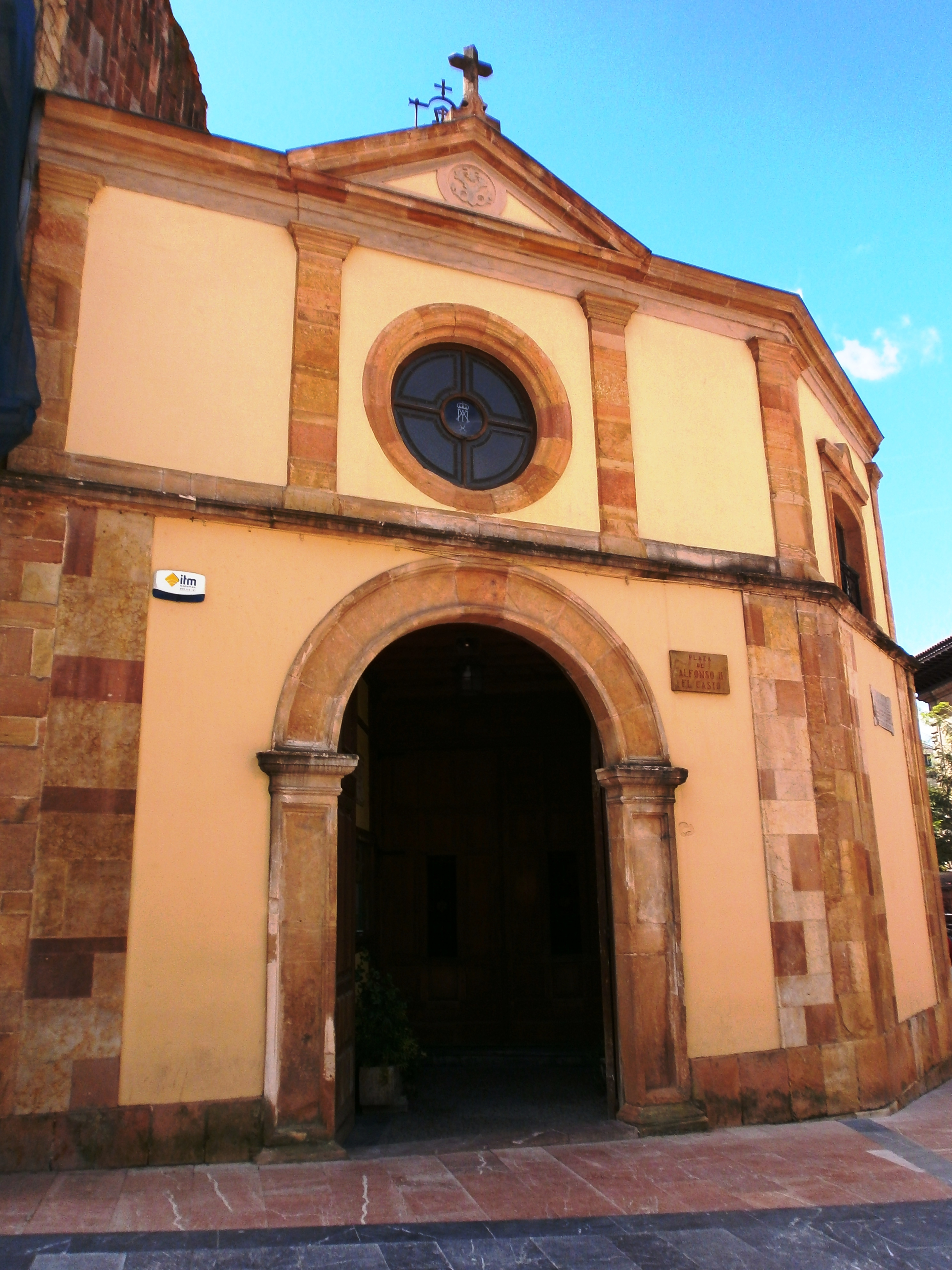 Capilla de la Virgen de la Esparanza. La Balesquida. Oviedo